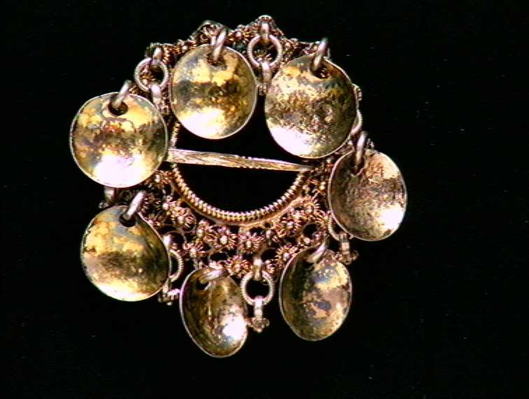 Erlandssølje i forgylt sølv med hengende løv og ringer med dupper. Innkjøpt på Notodden i Telemark i 1882. Foto Anne-Lise Reinsfelt / Norsk Folkemuseum.